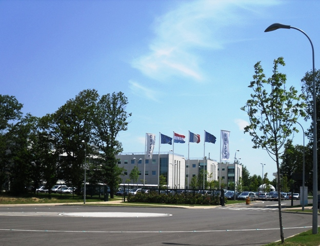 Le centre Thales de Limours (91)